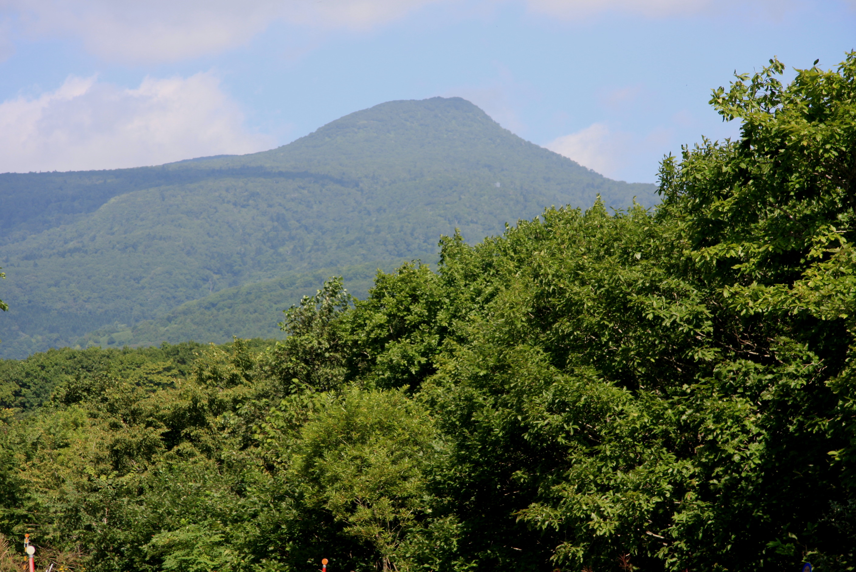 来馬岳 登別市札内より